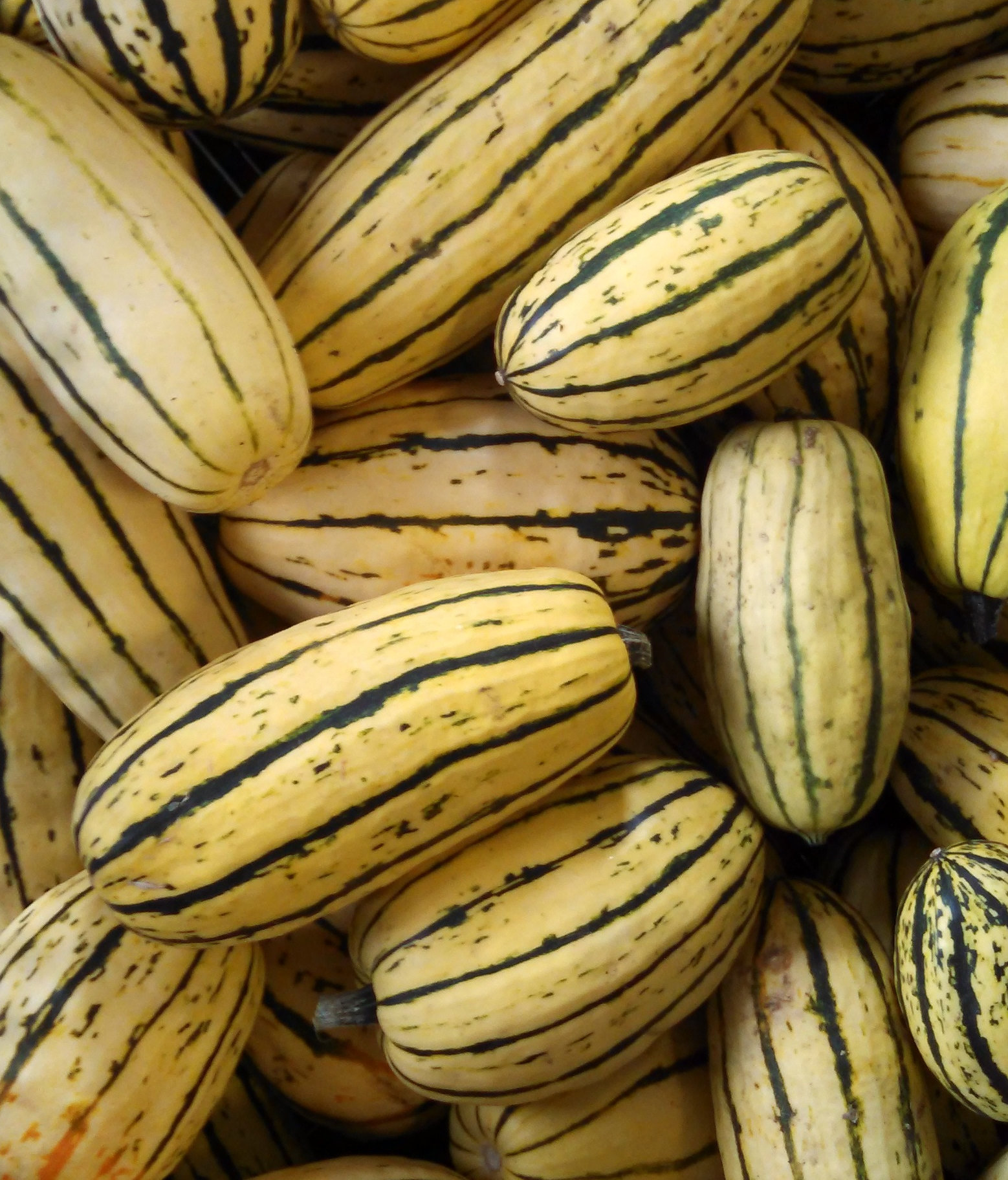 IMG_20140917_144447